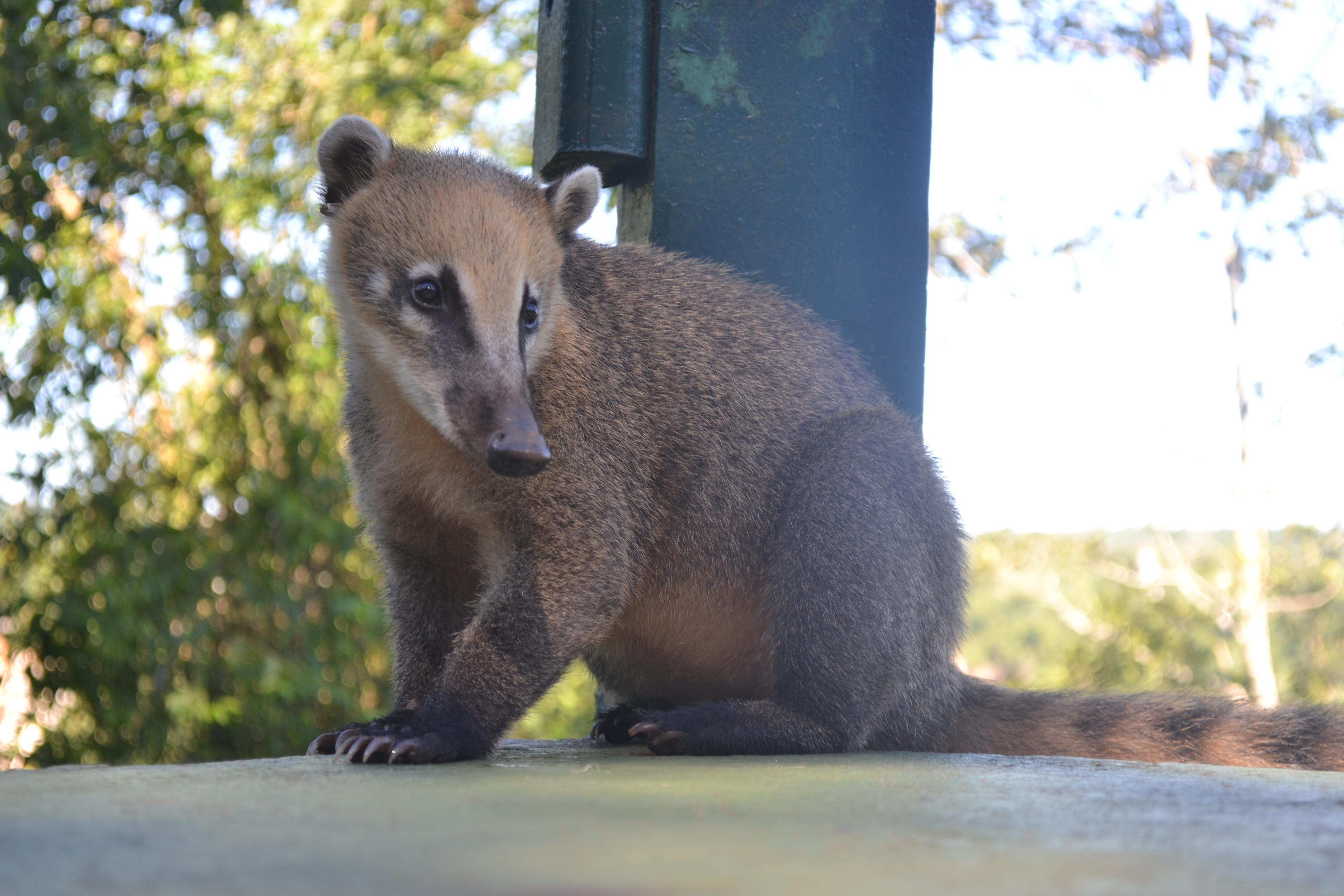 Quati fotografado no mirante das Cataratas do Iguaçu